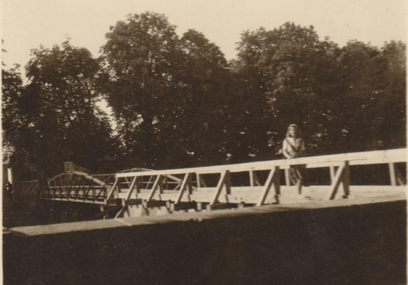 Esztergom Cifra híd 1945 augusztus